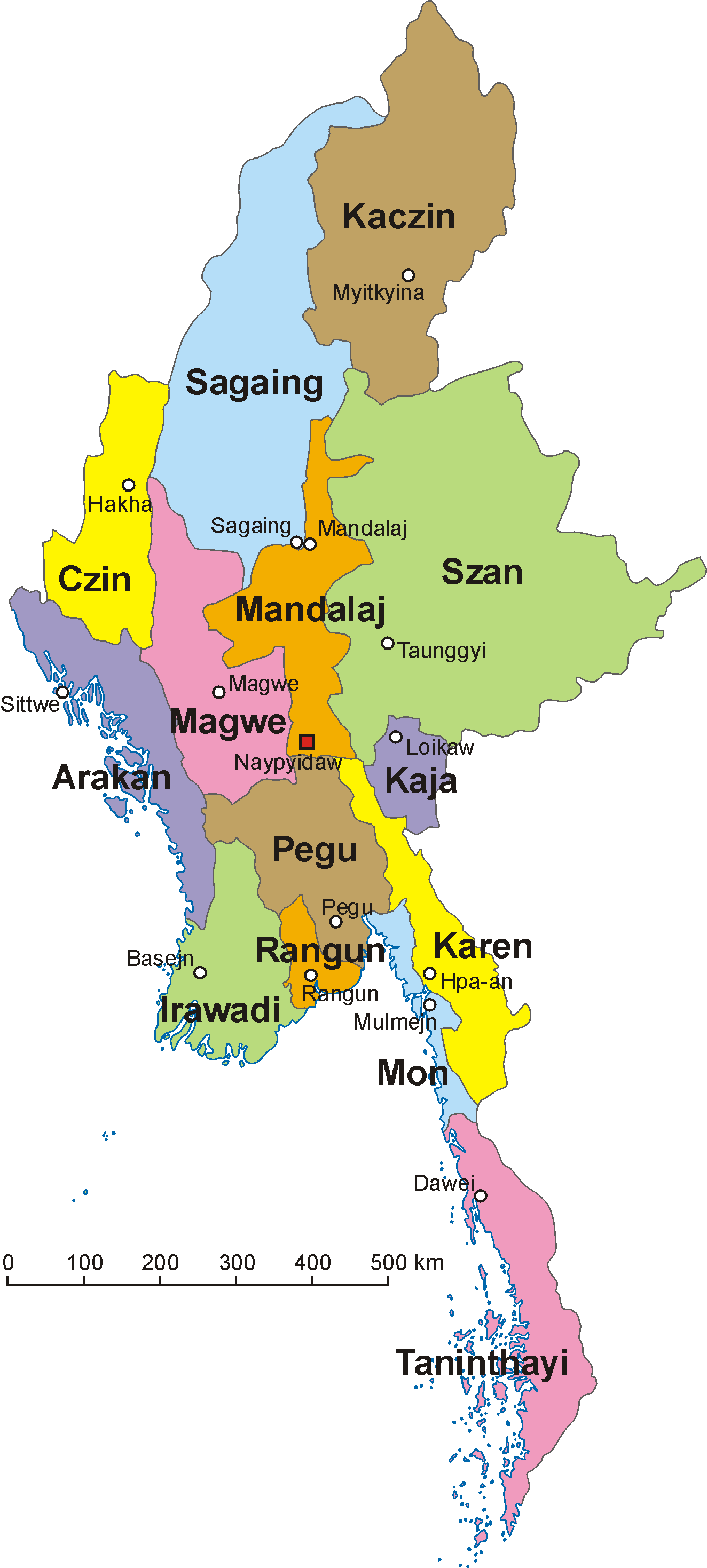 Mapa administracyjna Birmy. Autor: Aotearoa